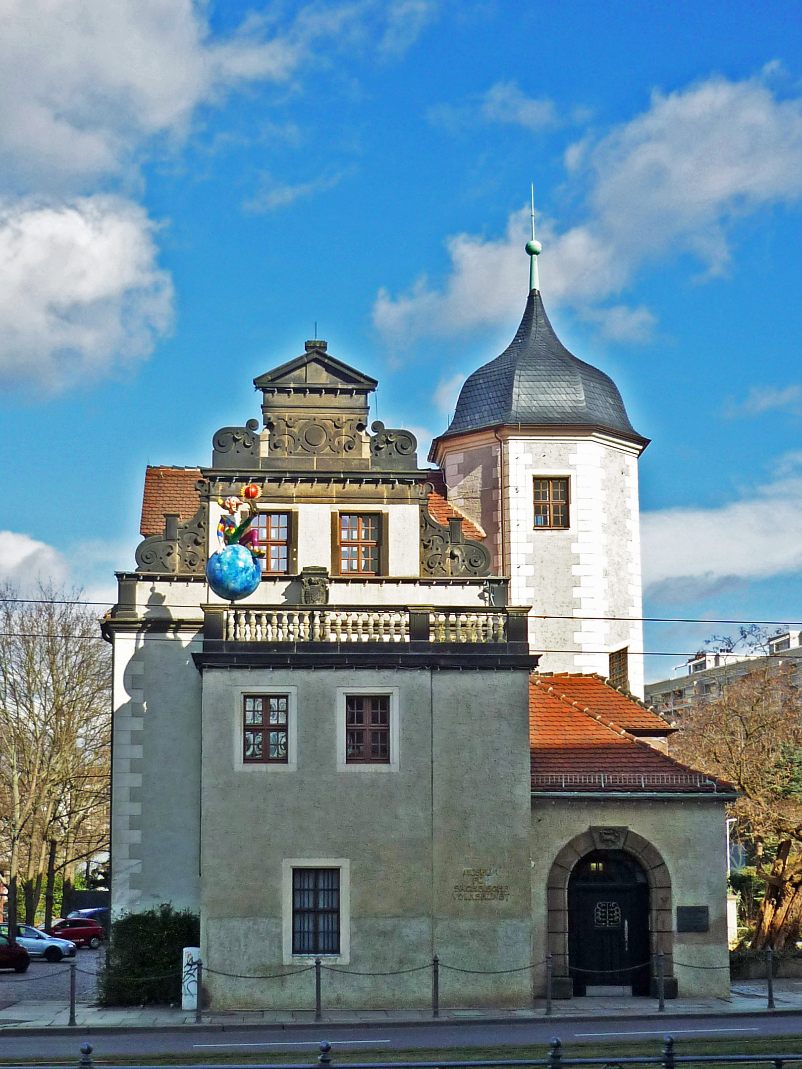 Jägerhof in Dresden, Volkskunstmuseum